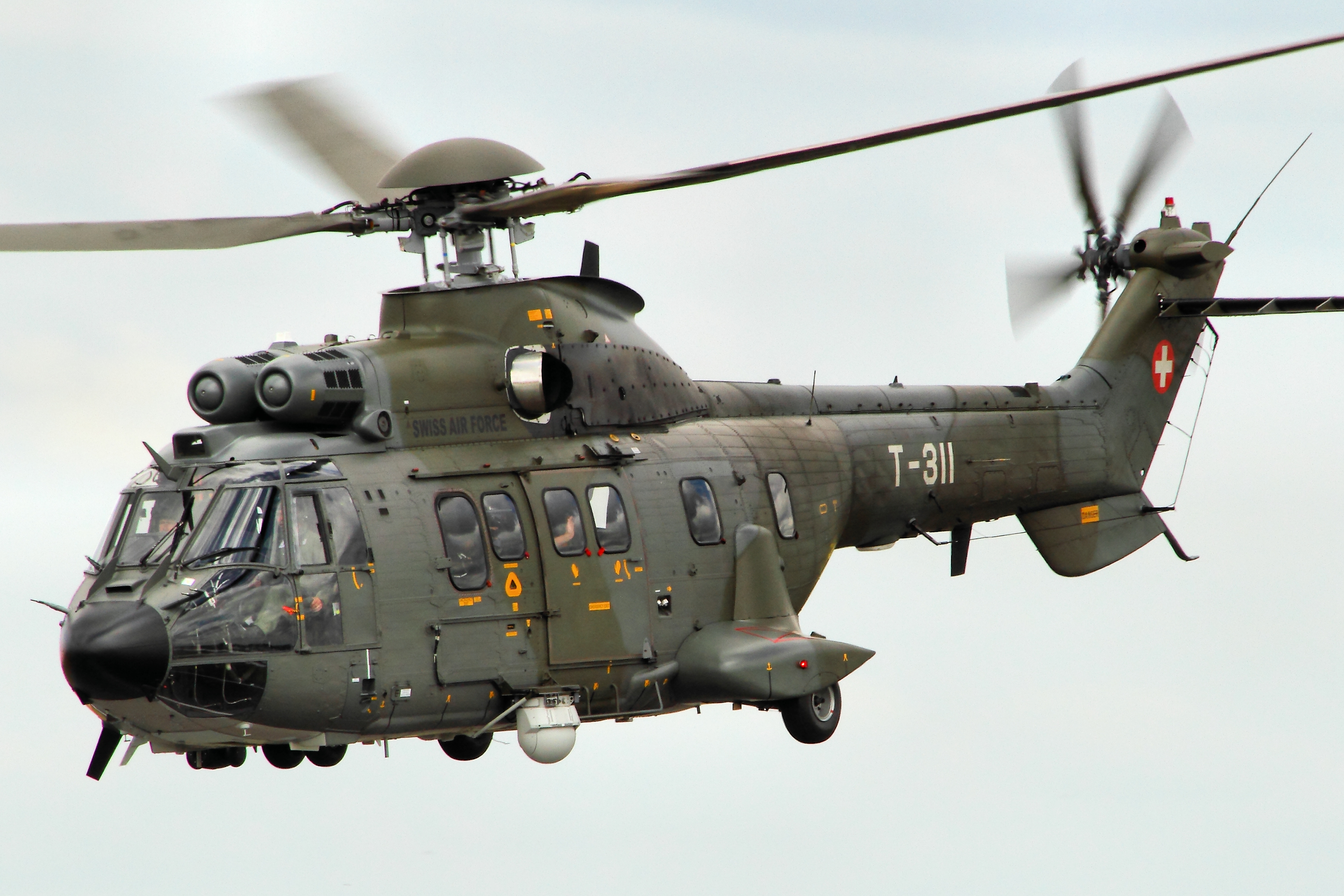 AS332M1 Super Puma - RIAT 2014